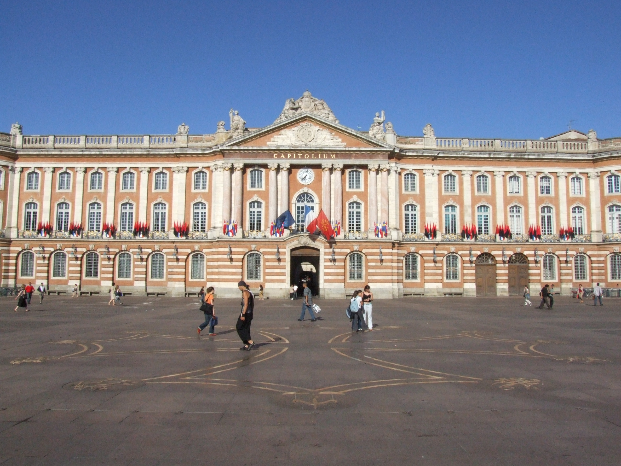 La façade de la mairie de Toulouse et au premier plan la croix occitane ornant le sol du Capitole.